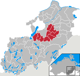 Amt Burg Stargard-Land in Mecklenburg-Vorpommern - District Mecklenburg-Strelitz (1992-2001)